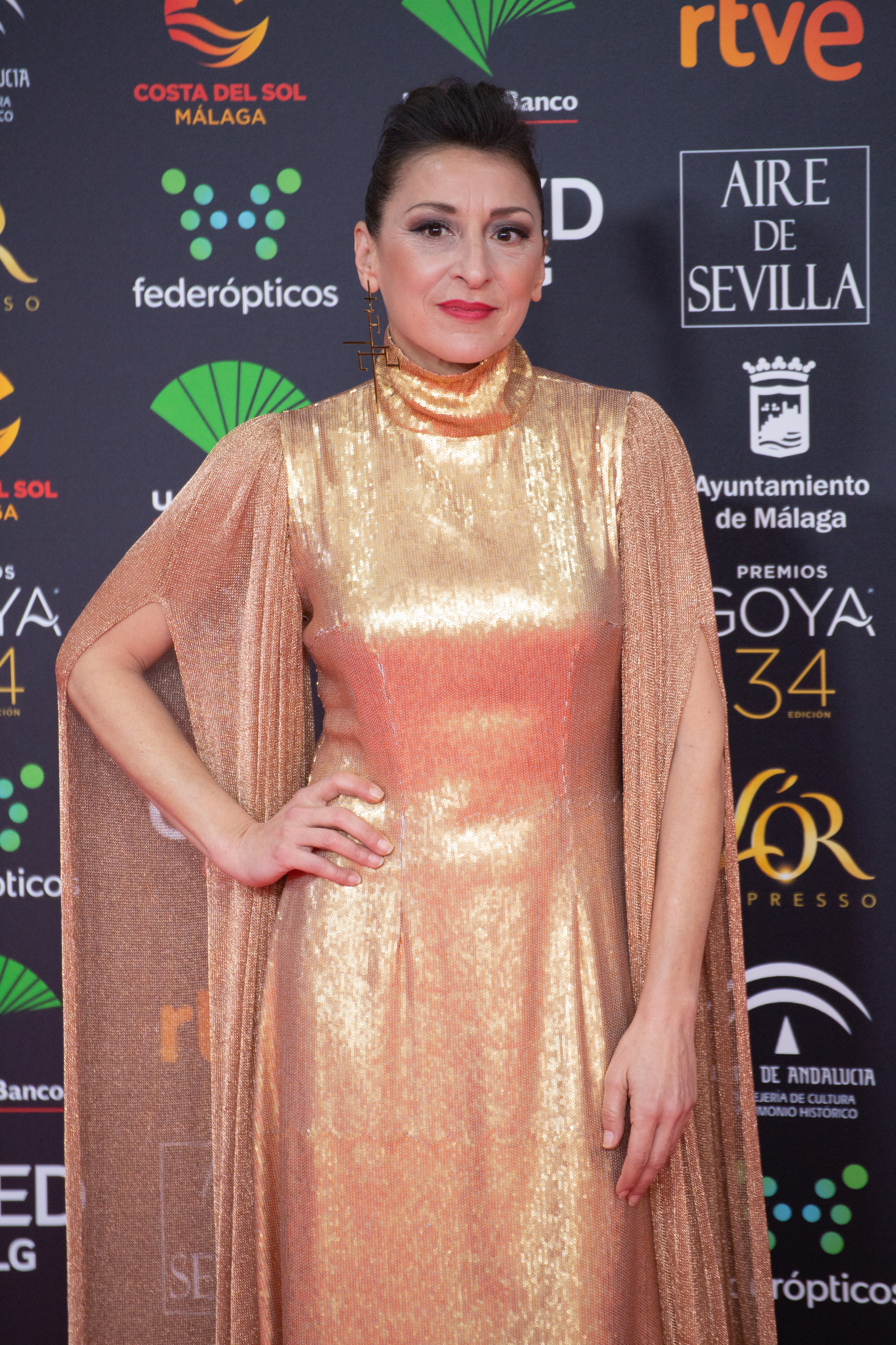 Mariola Fuentes en la alfombra roja de la gala de los Premios Goya 2020 celebrados en Málaga